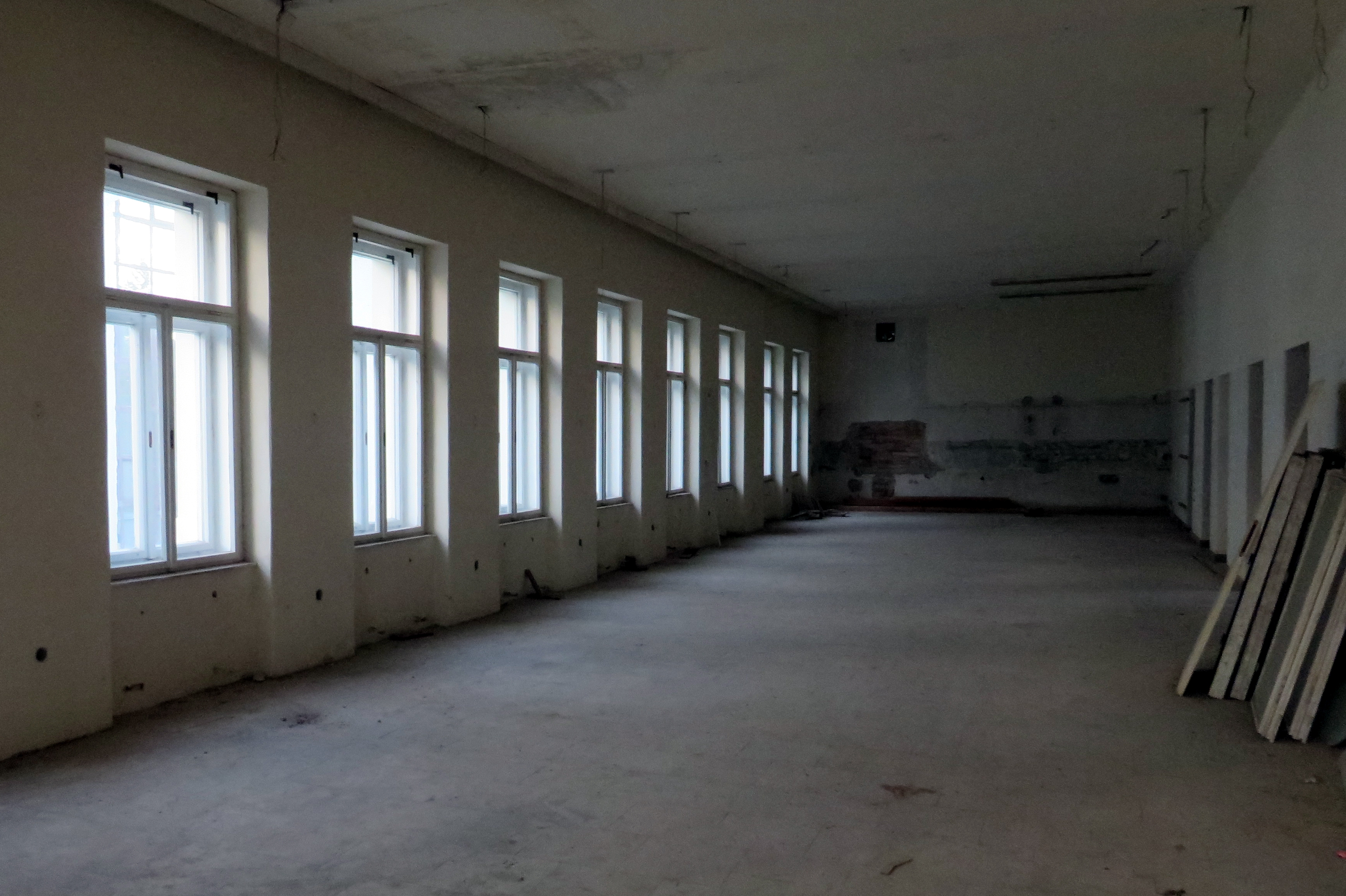 Interiér Občanské záložny v Poděbradech. Prostory v prvním patře nad Divadelní ulicí.